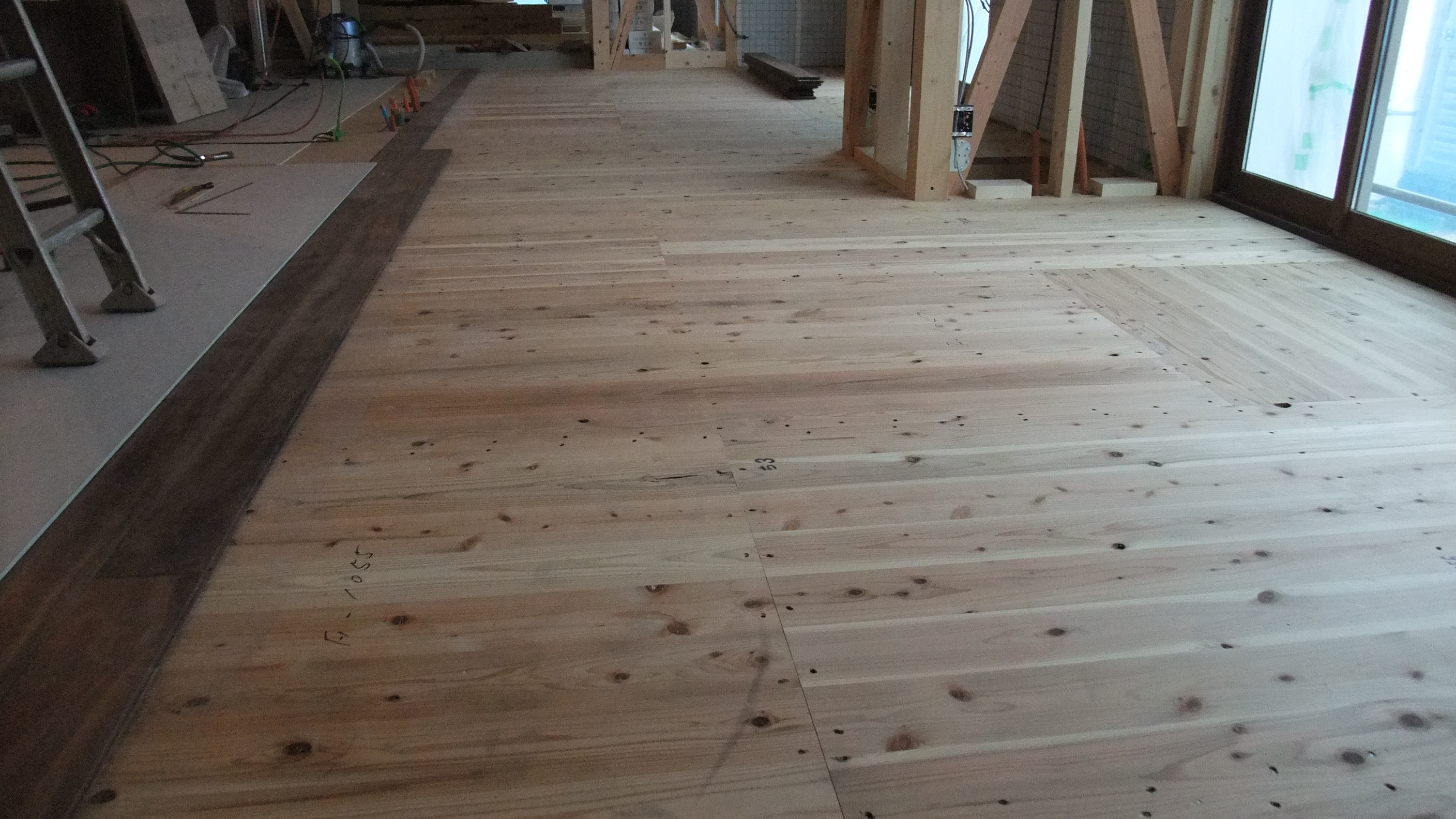 杉無垢材の横はぎ集成材（トライウッドパネル）。構造用合板の代わりに使用。左側からウォールナットの無垢フロアがその上に固定されていっている。